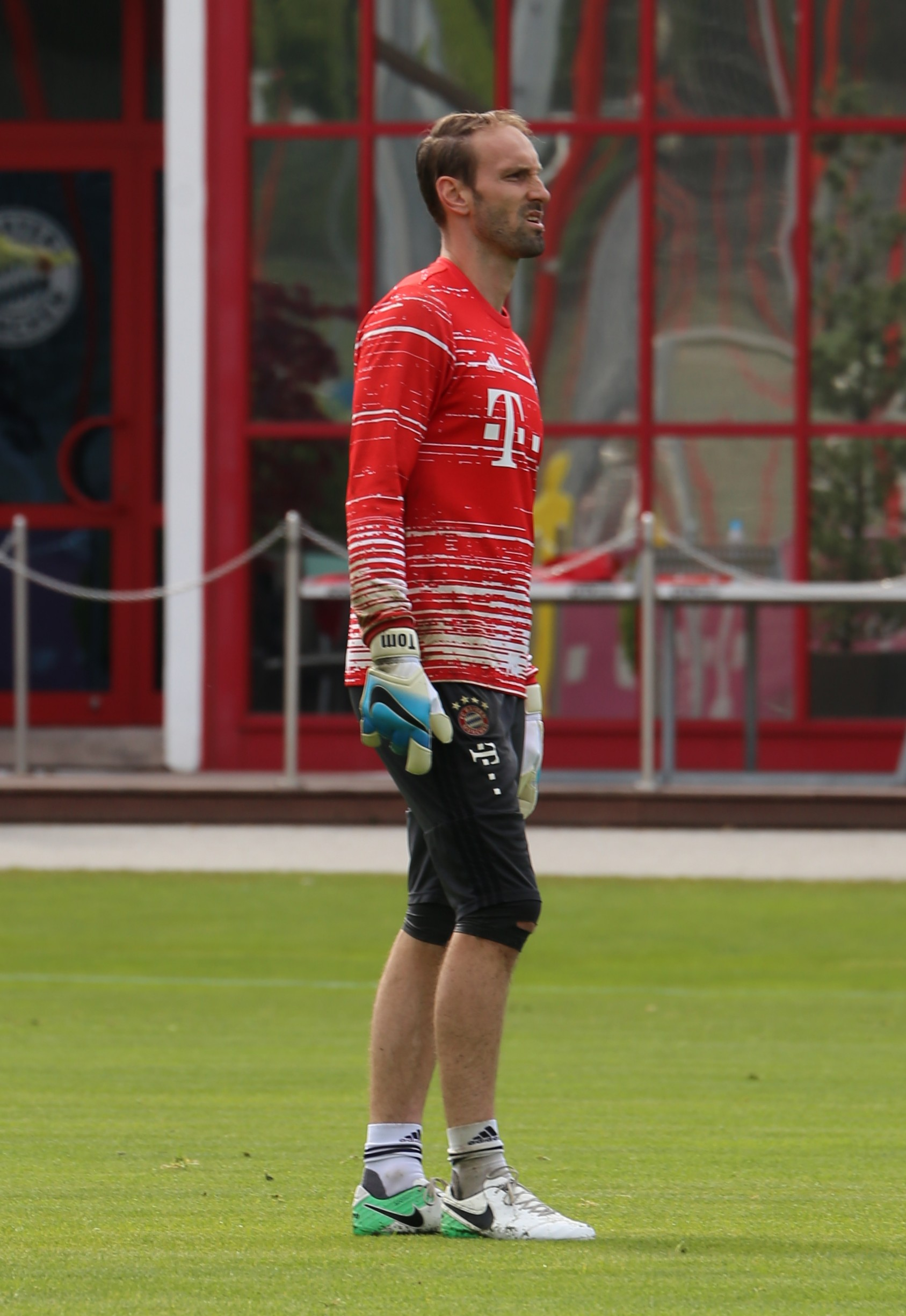 Tom Starke, am 3. Mai 2017 beim Training auf dem Gelände des FC Bayern München